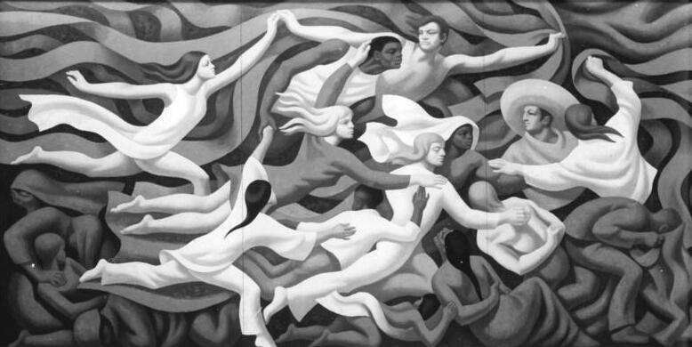 ADN-ZB Repro-6.5.76 Berlin-Gemälde im Palast der Republik- Zahlreiche bildende Künstler haben unseren Palast der Republik durch eine Fülle von Kunstwerken bereichert. Der Bildidee von Lothar Zitzmann liegt das Weltjugendlied zugrunde. Jugend aller Nationen trägt im unaufhaltsamen Vorwärtsstürmen und -fliegen rote Banner über die Erde.